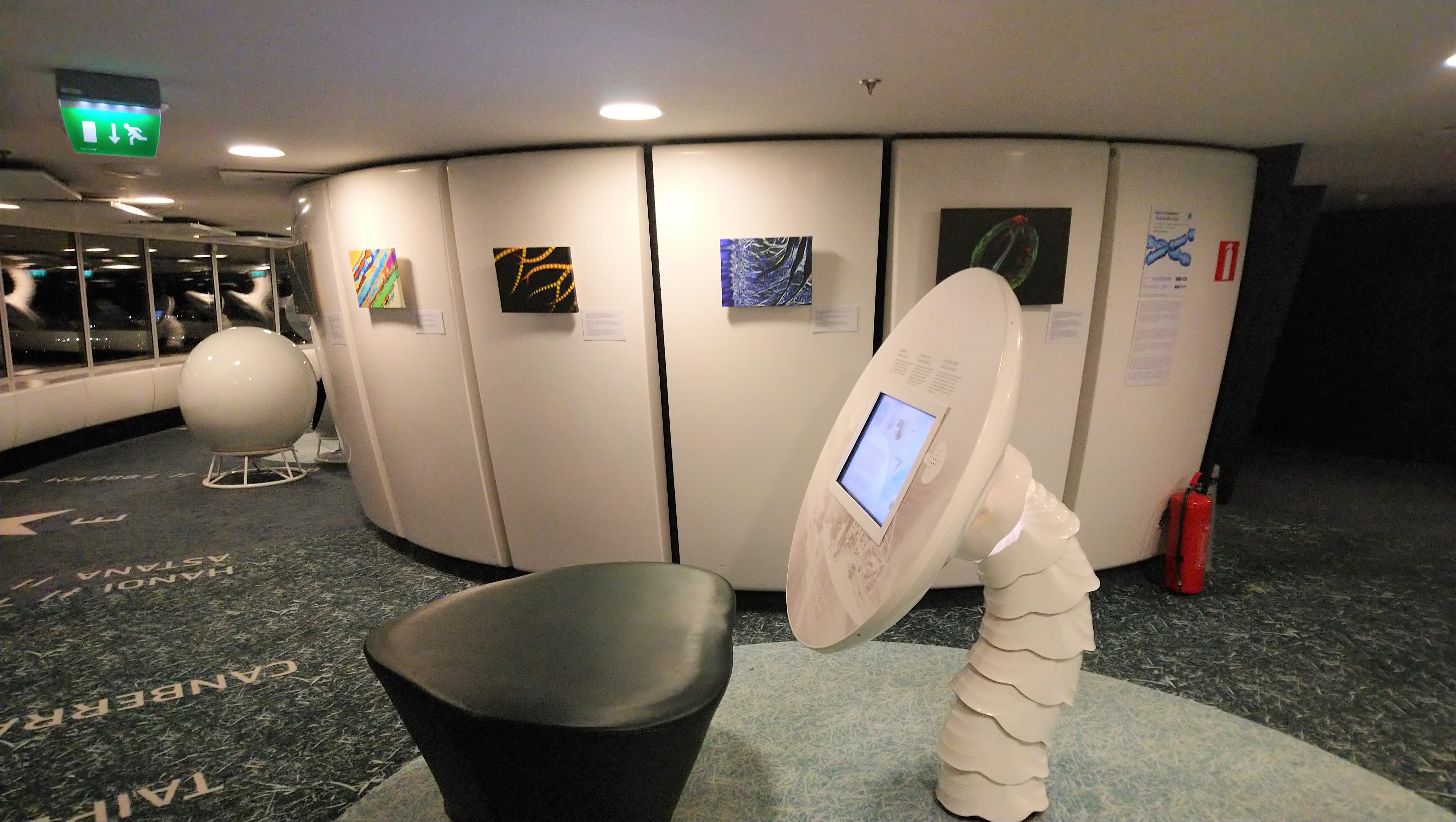 Näitus "Parimad teadusfotod 2015 & 2017" Tallinna teletorni 21. panoraamkorrusel.